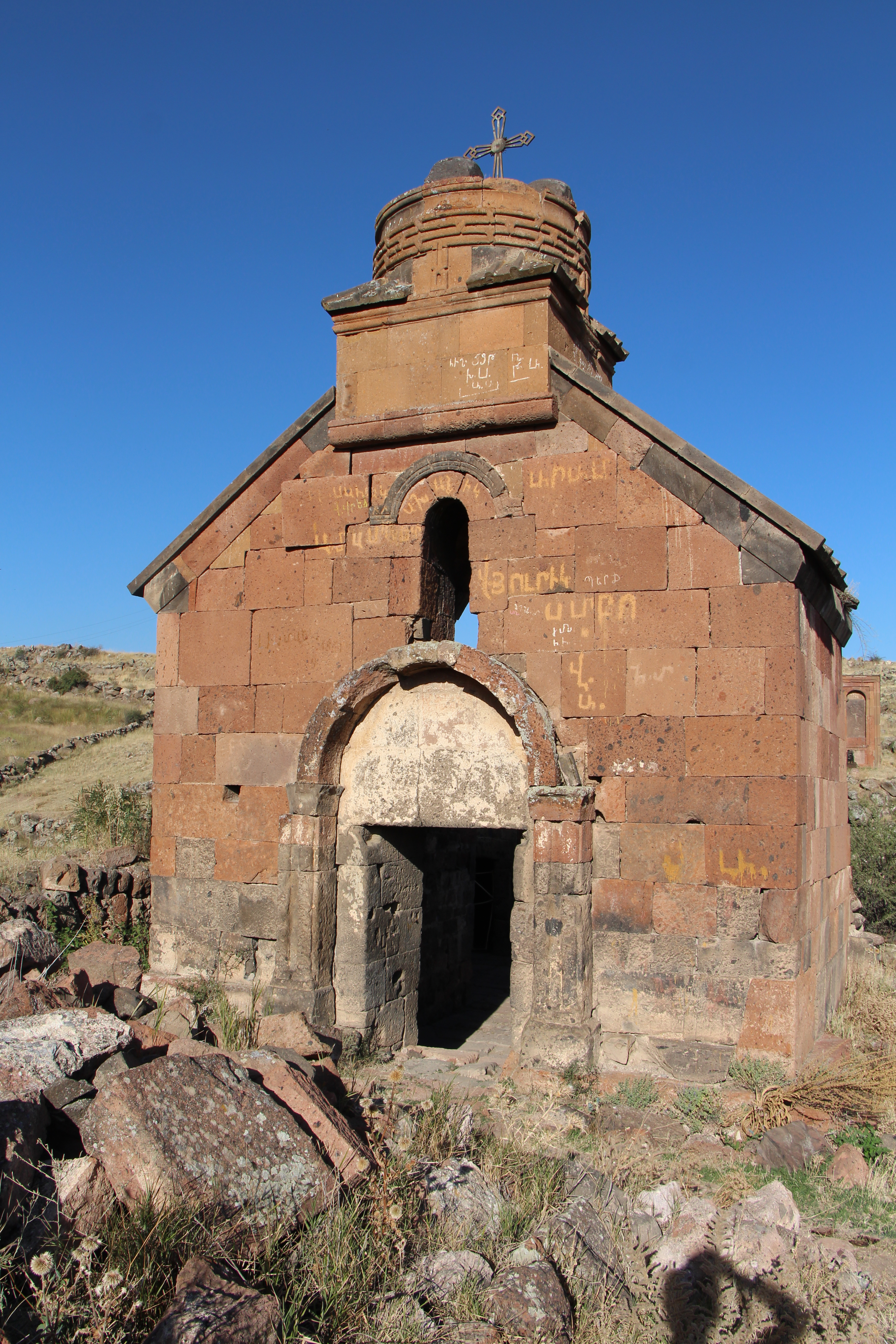 Բյուրական, Արագածոտնի մարզ, ԵԿԵՂԵՑԻ ԱՐՏԱՎԱԶԴԻԿ 5-6 դդ. ամ մասում 2.28/17 գյուղի եզրին 28/17